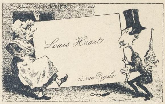 Carte de visite de Louis [Adrien] Huart (1813-1865) avec mention « Parlez au portier ».